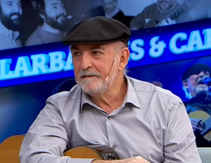 Mario Carrero en 2019.